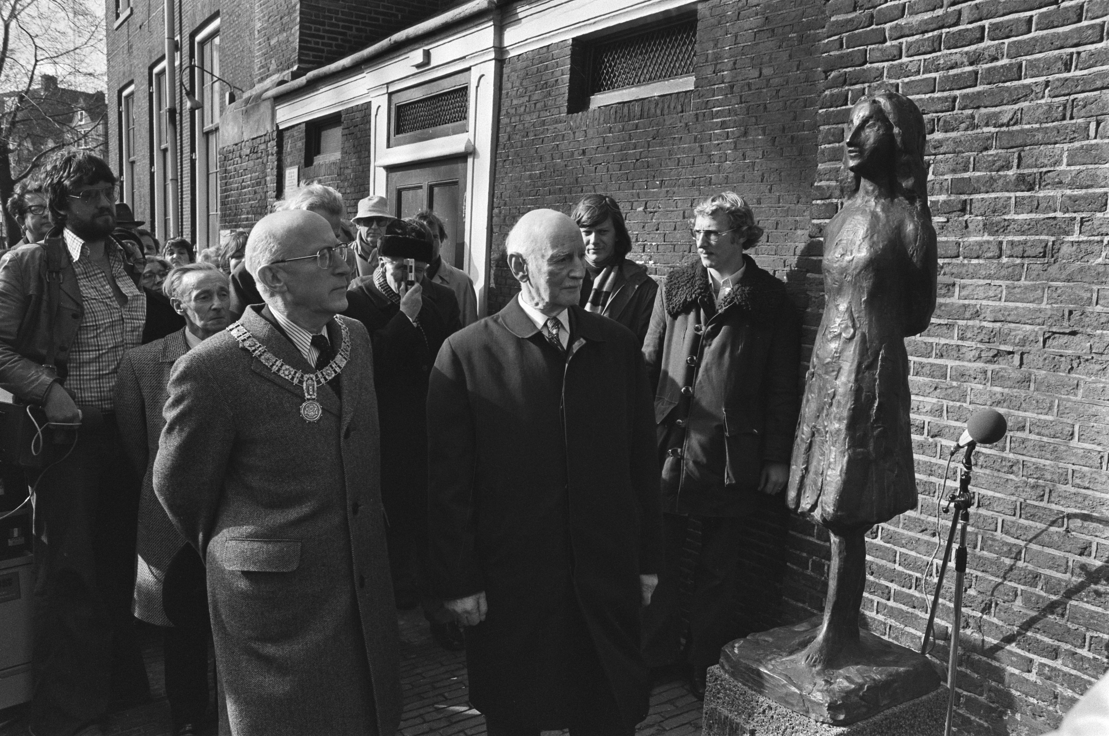 Collectie / Archief : Fotocollectie Anefo Reportage / Serie : Onthulling door burgemeester Samkalden van het beeld van Anne Frank op de Westermarkt te Amsterdam Beschrijving : Samkalden en Otto Frank (vader van Anne) bij het beeldje Annotatie : Het beeld is een ontwerp van Mari Andriessen Datum : 14 maart 1977 Locatie : Amsterdam, Noord-Holland Trefwoorden : beeldhouwkunst, burgemeesters, onthullingen, oorlogsmonumenten, standbeelden Persoonsnaam : Frank, Otto, Samkalden, Ivo Fotograaf : Verhoeff, Bert / Anefo, [onbekend] Auteursrechthebbende : Nationaal Archief Materiaalsoort : Negatief (zwart/wit) Nummer archiefinventaris : bekijk toegang 2.24.01.05 Bestanddeelnummer : 929-0706